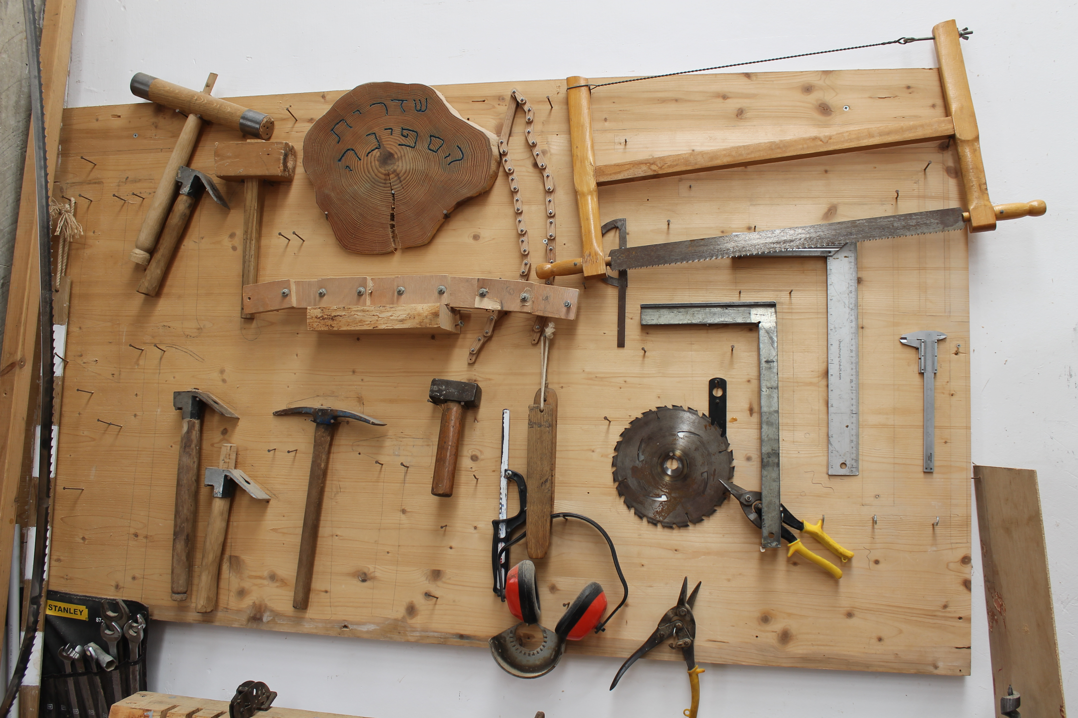 קלאסי ומודרני - חלק מארגז כלי העבודה ששימש את צוות הבנייה בצריף הסירות בעכו